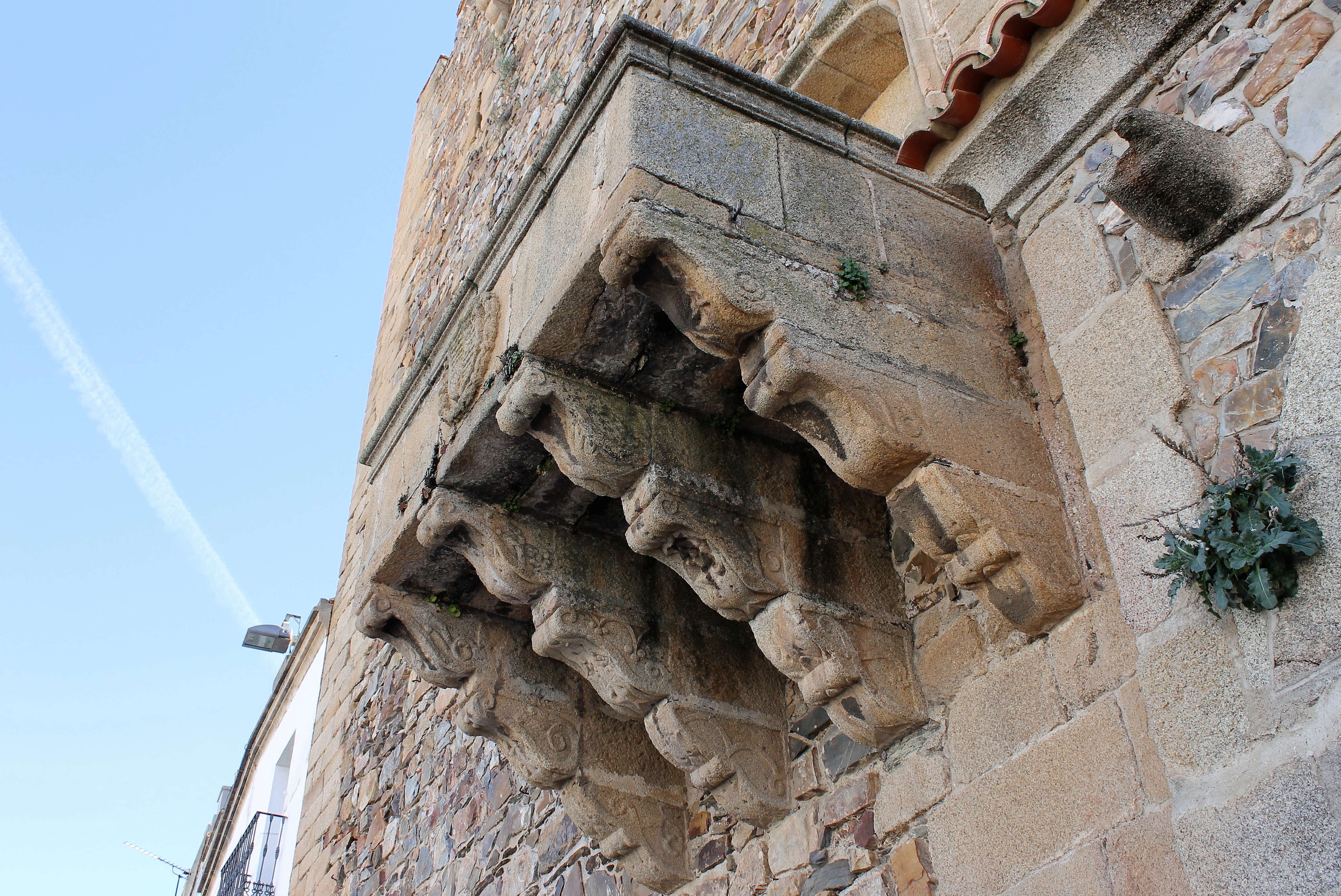 Balcón del siglo XVI, Cáceres, Spain